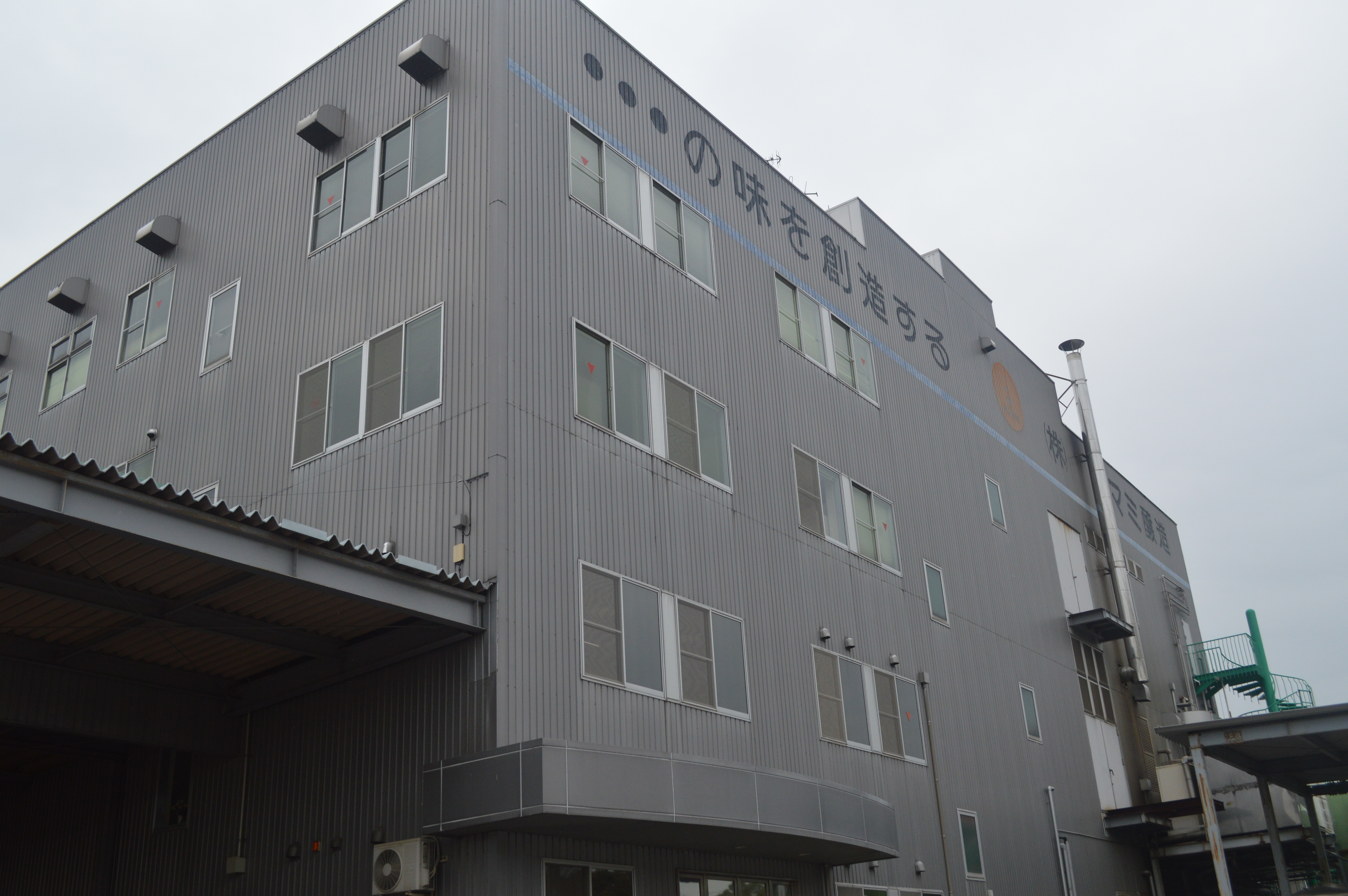 ヤマミ醸造の工場